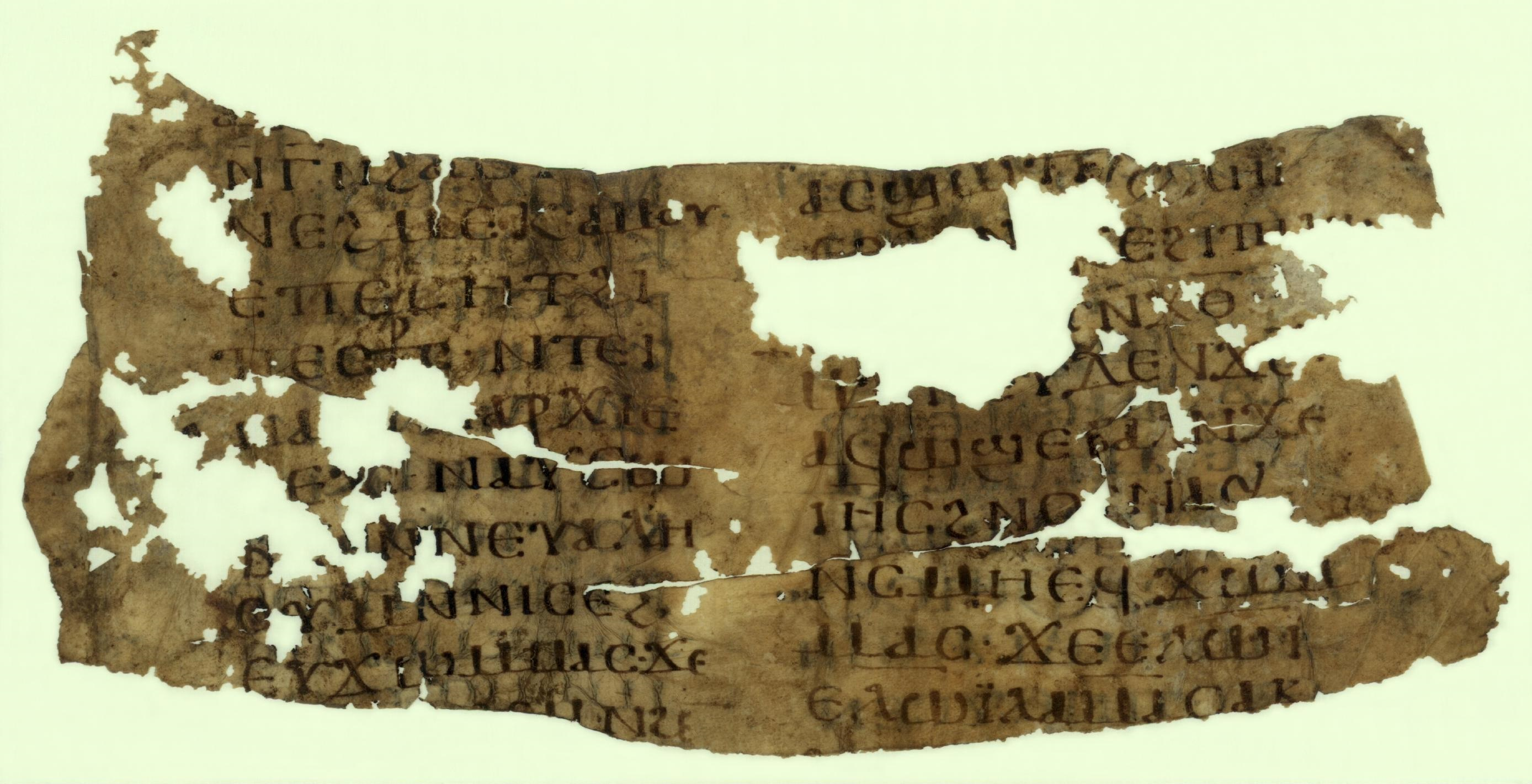 fragment of the codex with the text of Mark 15:29–31.33-34